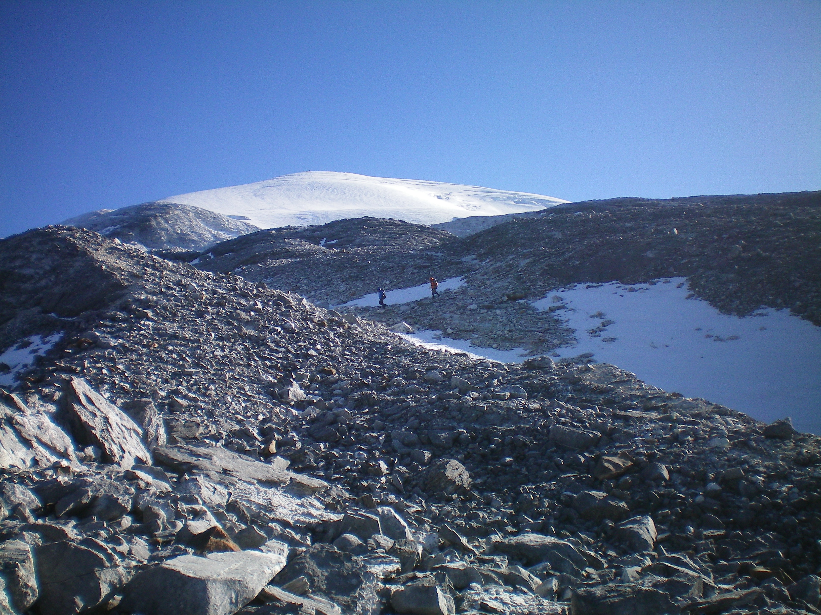 哈巴雪山的雪坡